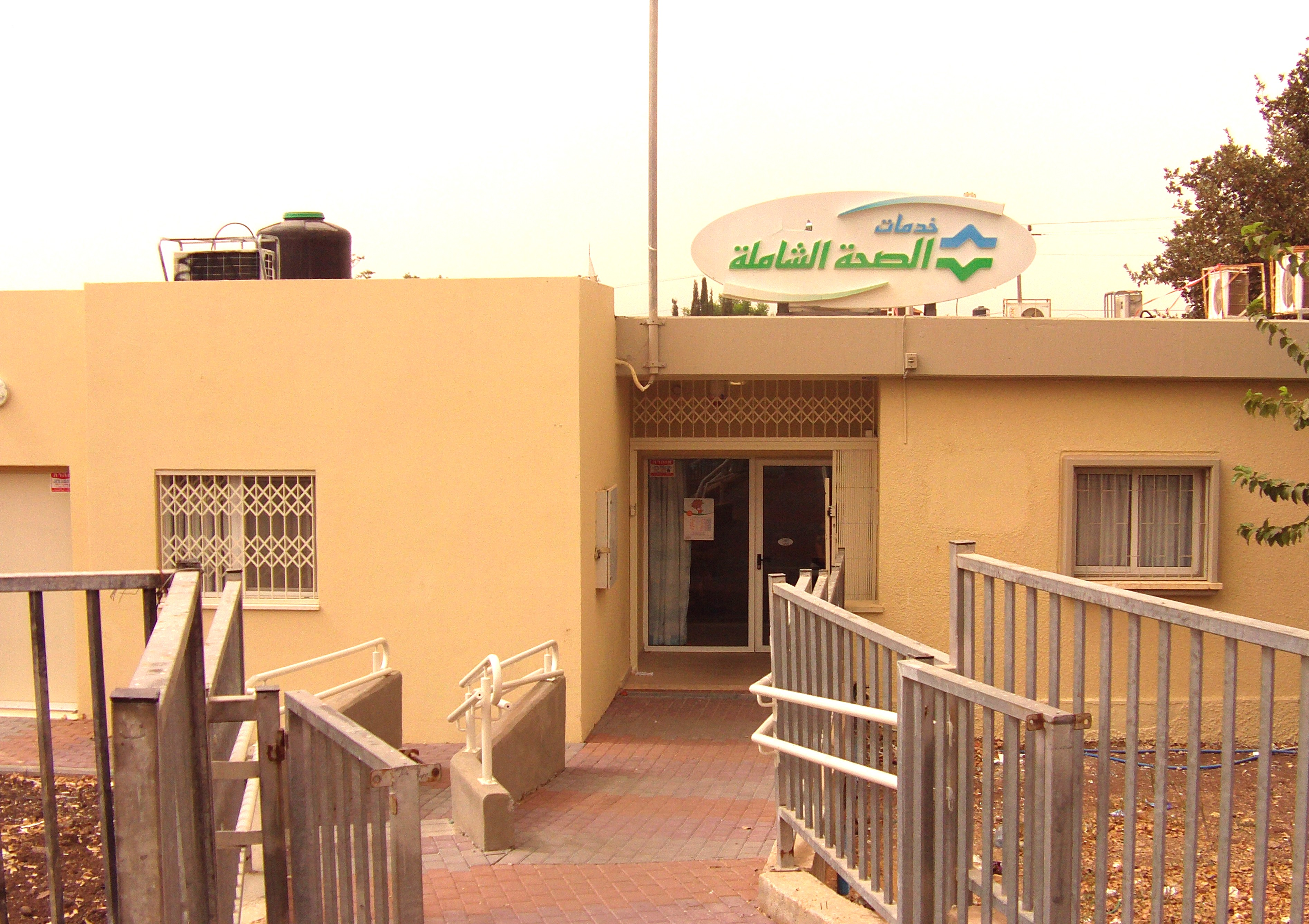 טובא זנגריה כפר בדווי בגליל מרפאת קופת חולים